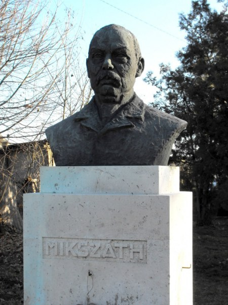 Herczeg Klára (született: Weiss Klára) szobrász-, érem- és porcelánművész szobra Mikszáth Kálmán címmel Mohorán.